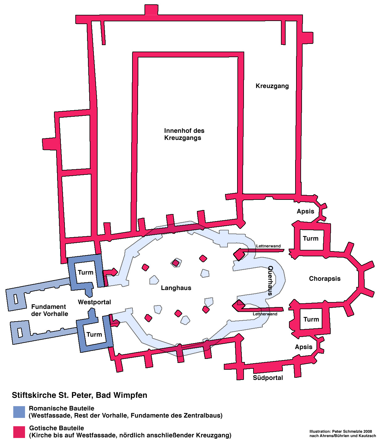 Nach Norden ausgerichteter Grundriss der Stiftskirche St. Peter in Bad Wimpfen. In blau sind die romanischen Bestandteile (Westfassade, Reste der Vorhalle, Fundamente des ehemaligen Zentralbaus), rot sind die im 13. bis 15. Jahrhundert erbauten gotischen Teile der Kirche sowie des im Norden anschließenden Kreuzgangs.